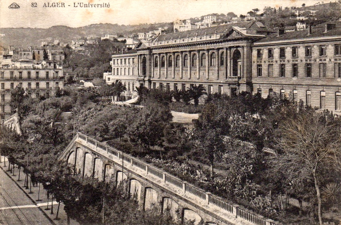 Université d'Alger, années 1920. Elle a été fondée en 1909.